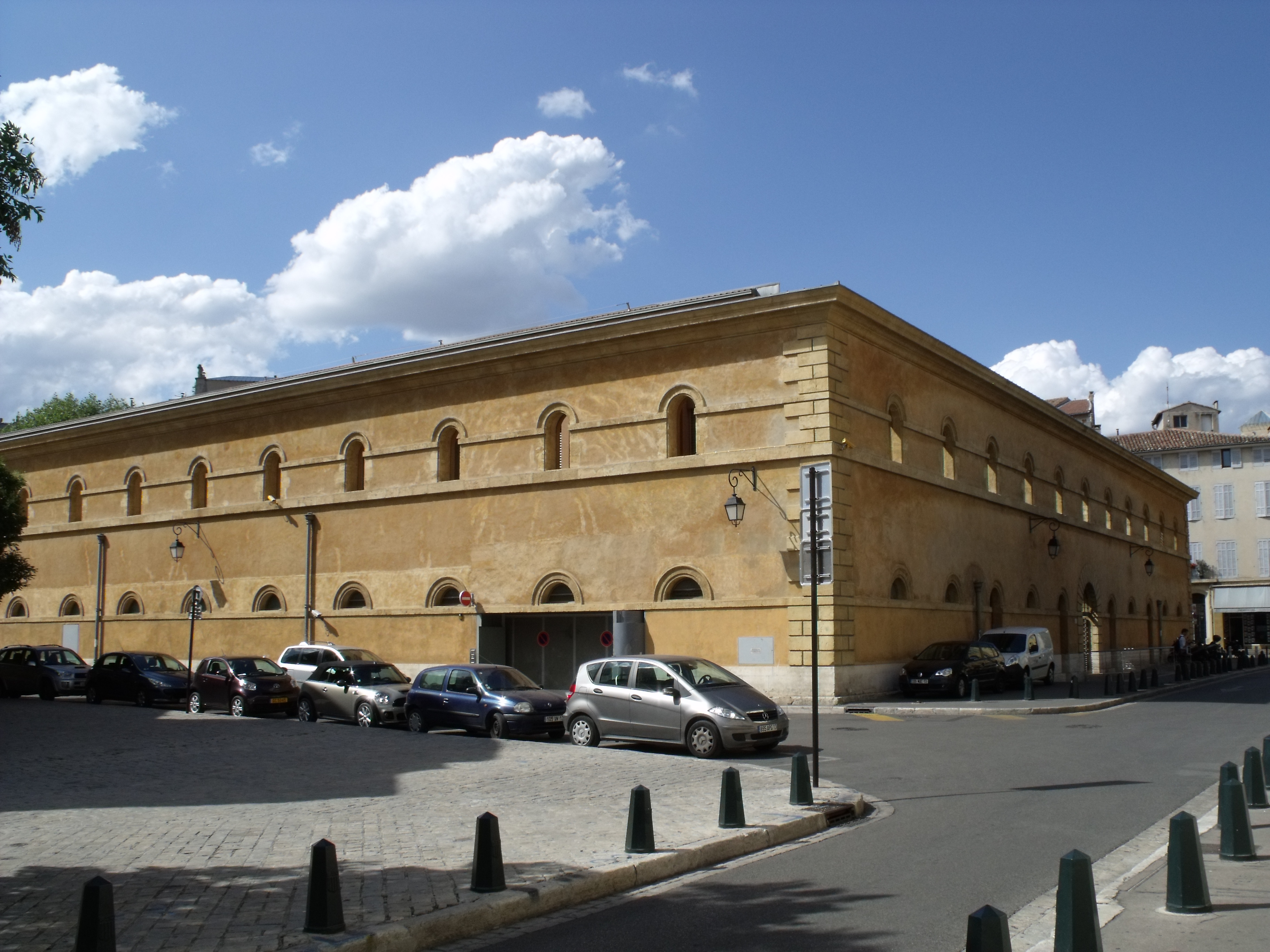 Ancienne prison d'Aix-en-Provence, reconvertie en annexe du palais de justice.